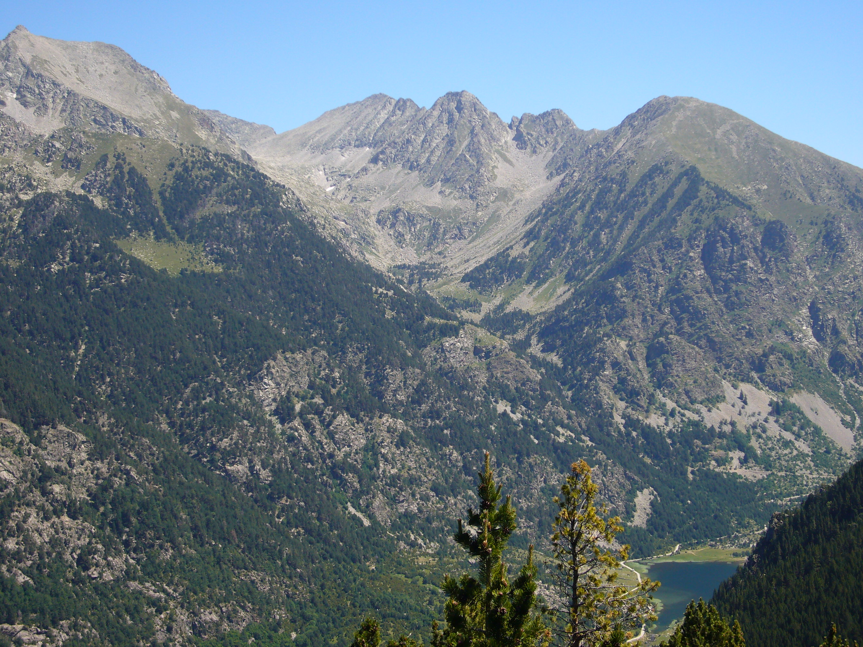 Vall de Sarradé vist des de Casesnoves; la Vall de Boí, Alta Ribagorça, Catalunya.